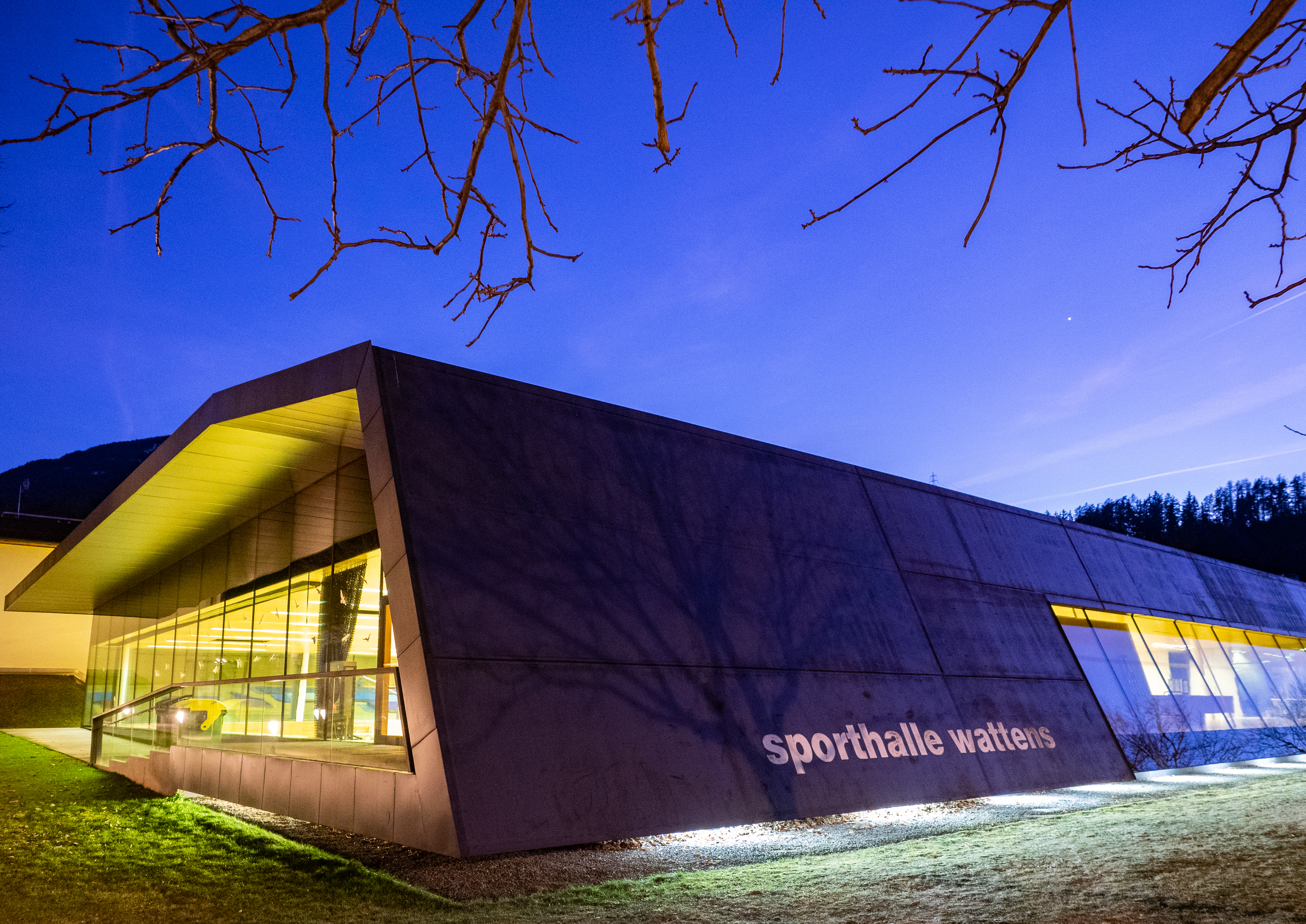 Sporthalle in Wattens von Norden